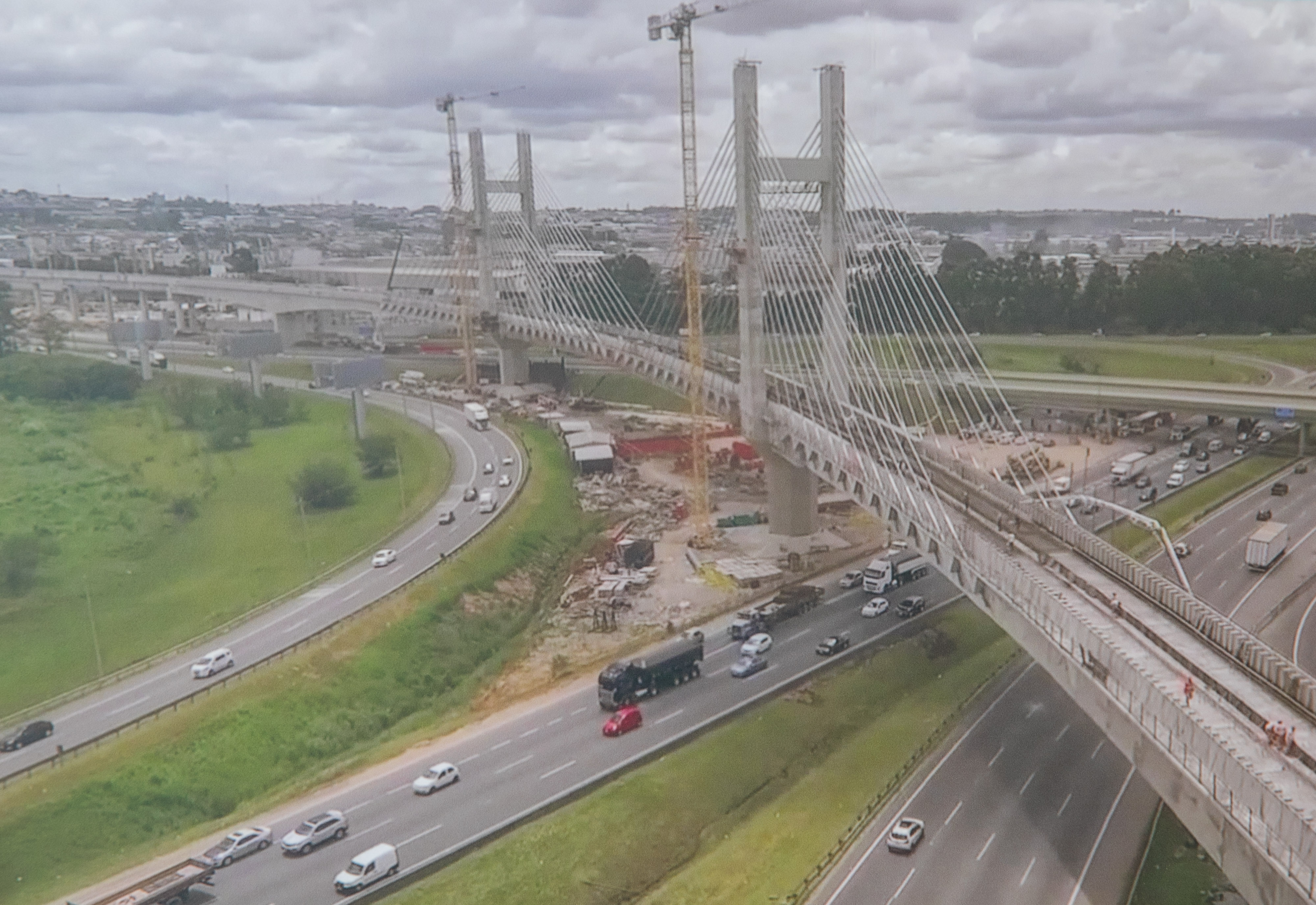 O governador do Estado de São Paulo, Geraldo Alckmin, entrega linha 13 Jade da CPTM em Guarulhos. Local: Guarulhos/ SP Data: 31/03/2018 Foto: Governo do Estado de São Paulo. Ponte em construção sobre a Rodovia Ayrton Senna